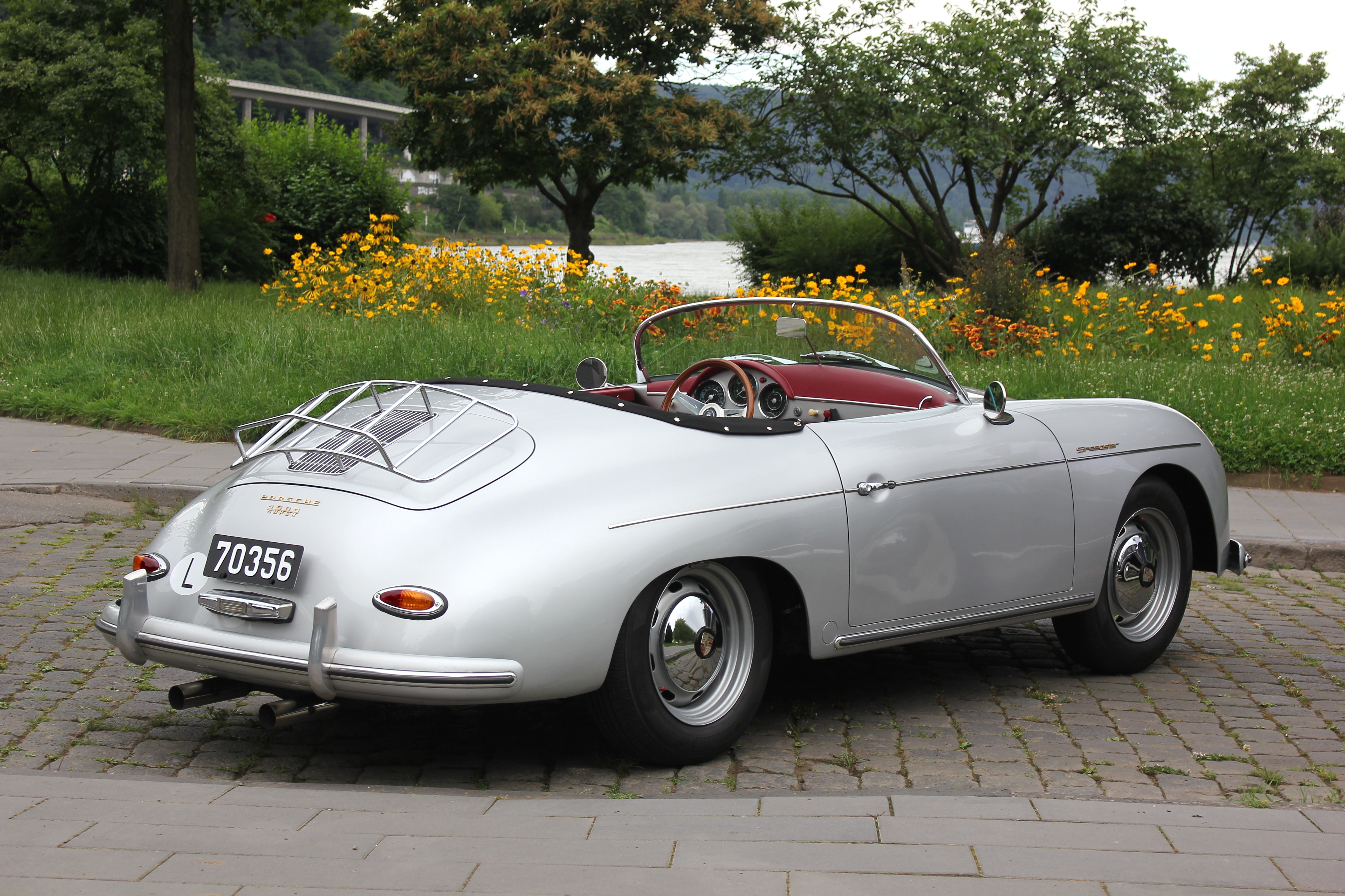 Porsche 356 A 1600 Super Speedster bei der Europa-Klassik Andernach, lt. Ergebnisliste Baujahr 1956, 1582 cm³, 75 PS bei 5000/min; Nardi-Lenkrad nachgerüstet. Die Heckleuchten stammen von einem 1957er Modell.